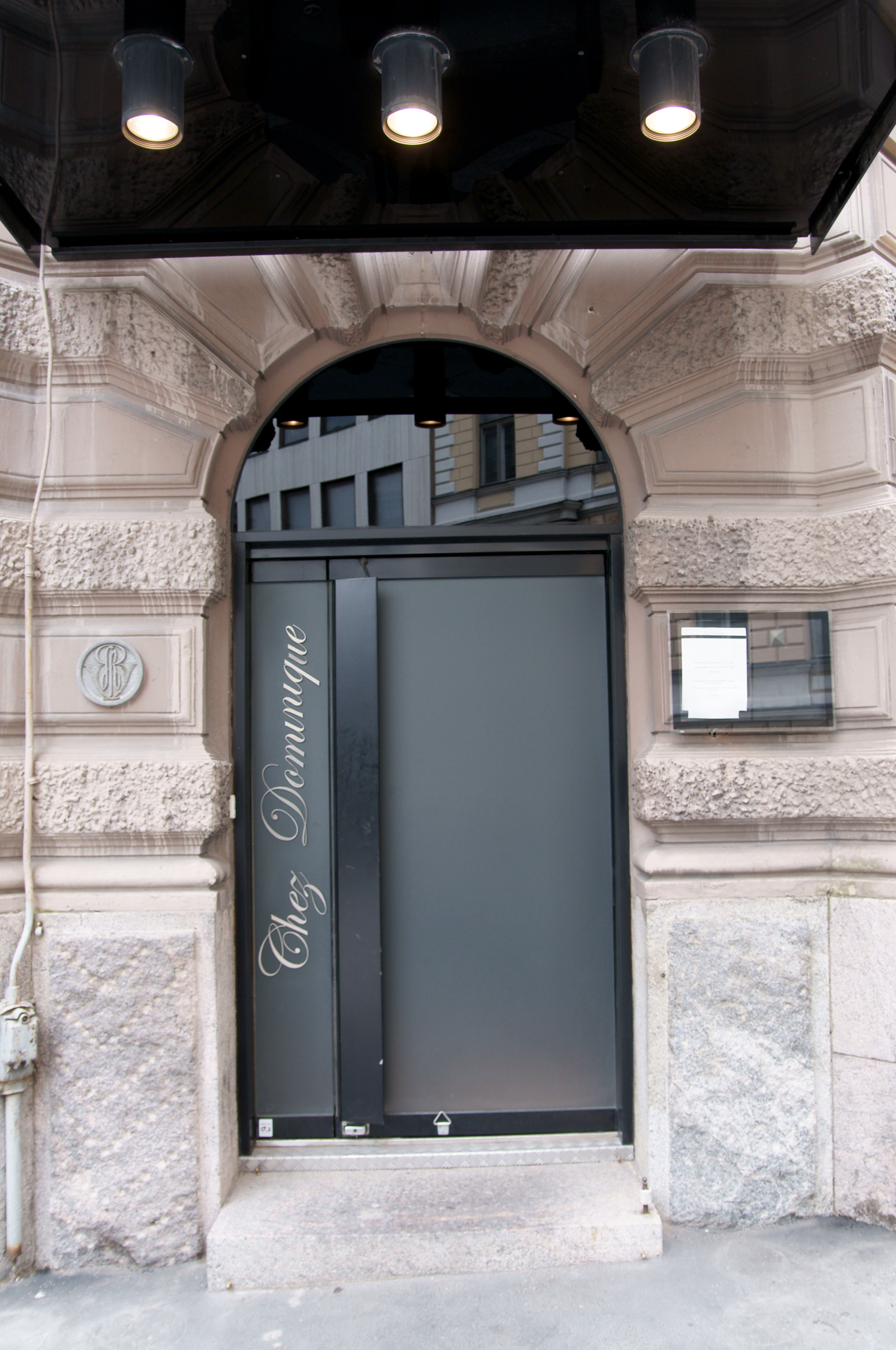 Chez Dominiquen etuovi.